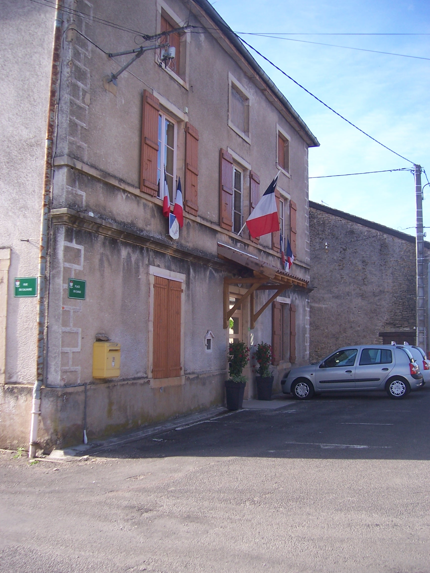 Mairie de Plottes